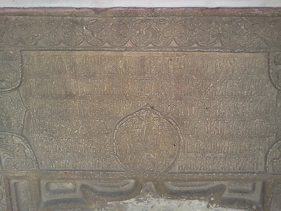 Pisania bisericii vechi de la Filipeștiide Târg